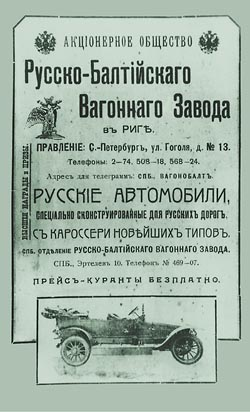 Рекламный лист Русско-Балтийского Вагонного Завода